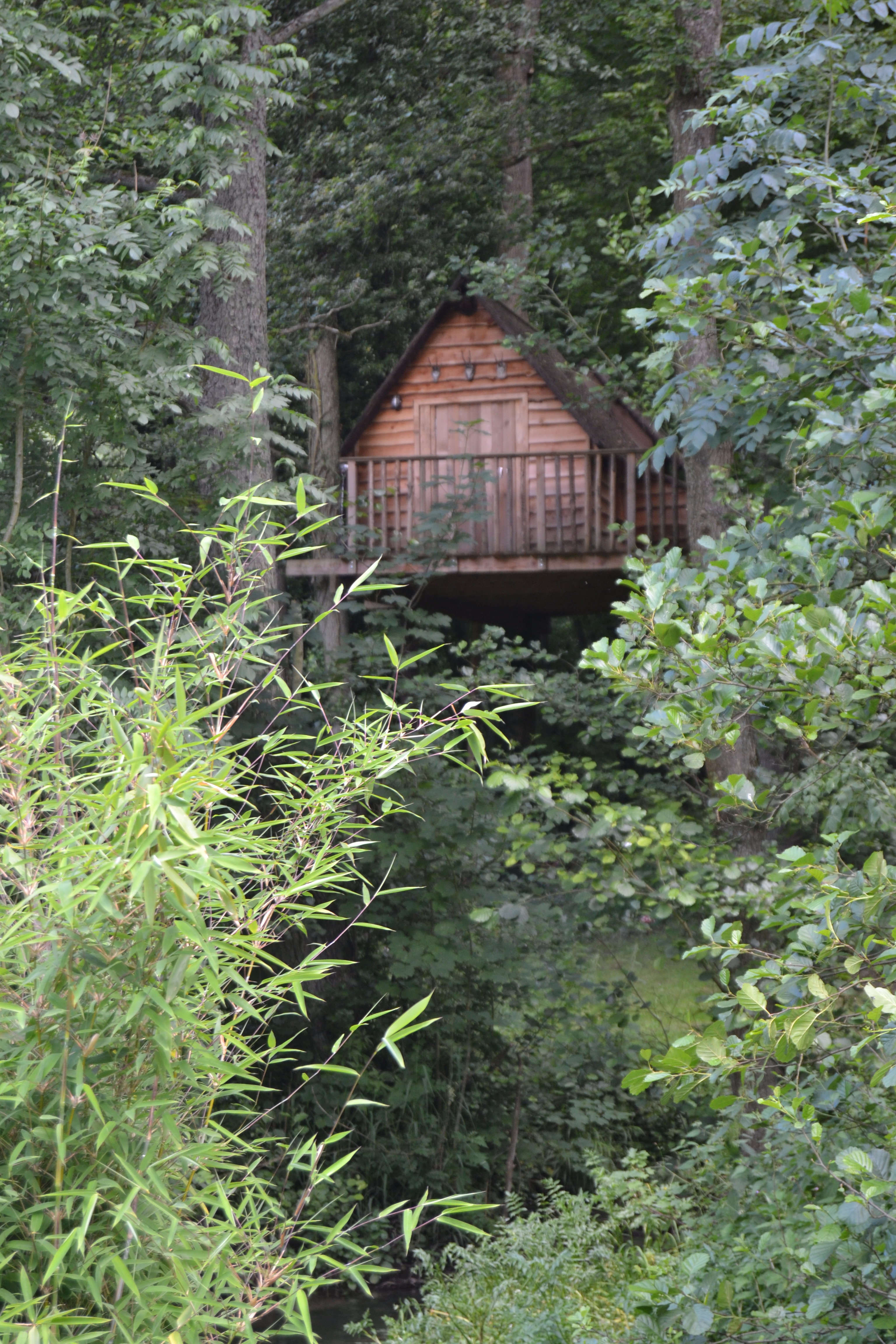 La cabane de Diego, Moulin de Lisogne